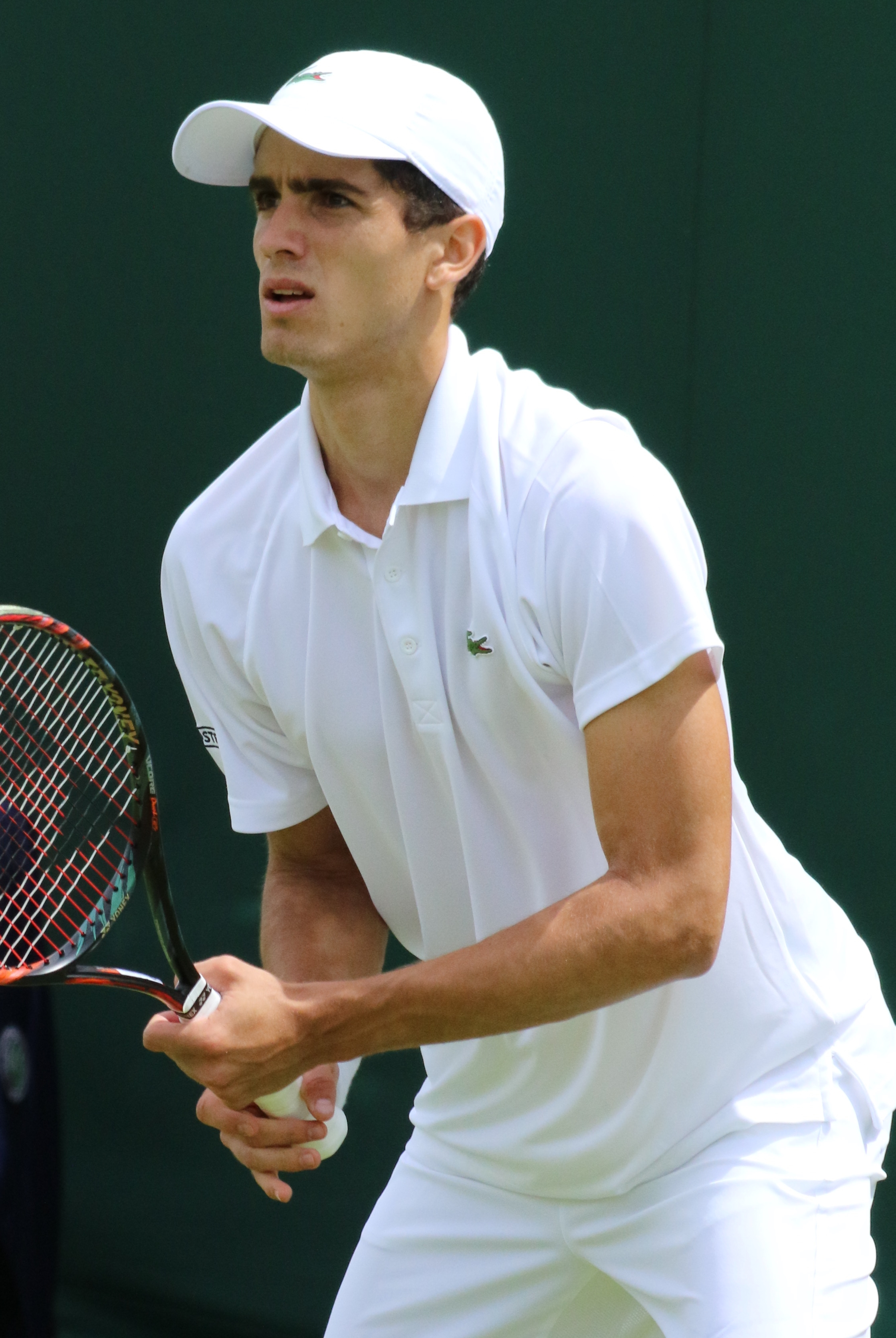 Herbert WM16 (6)